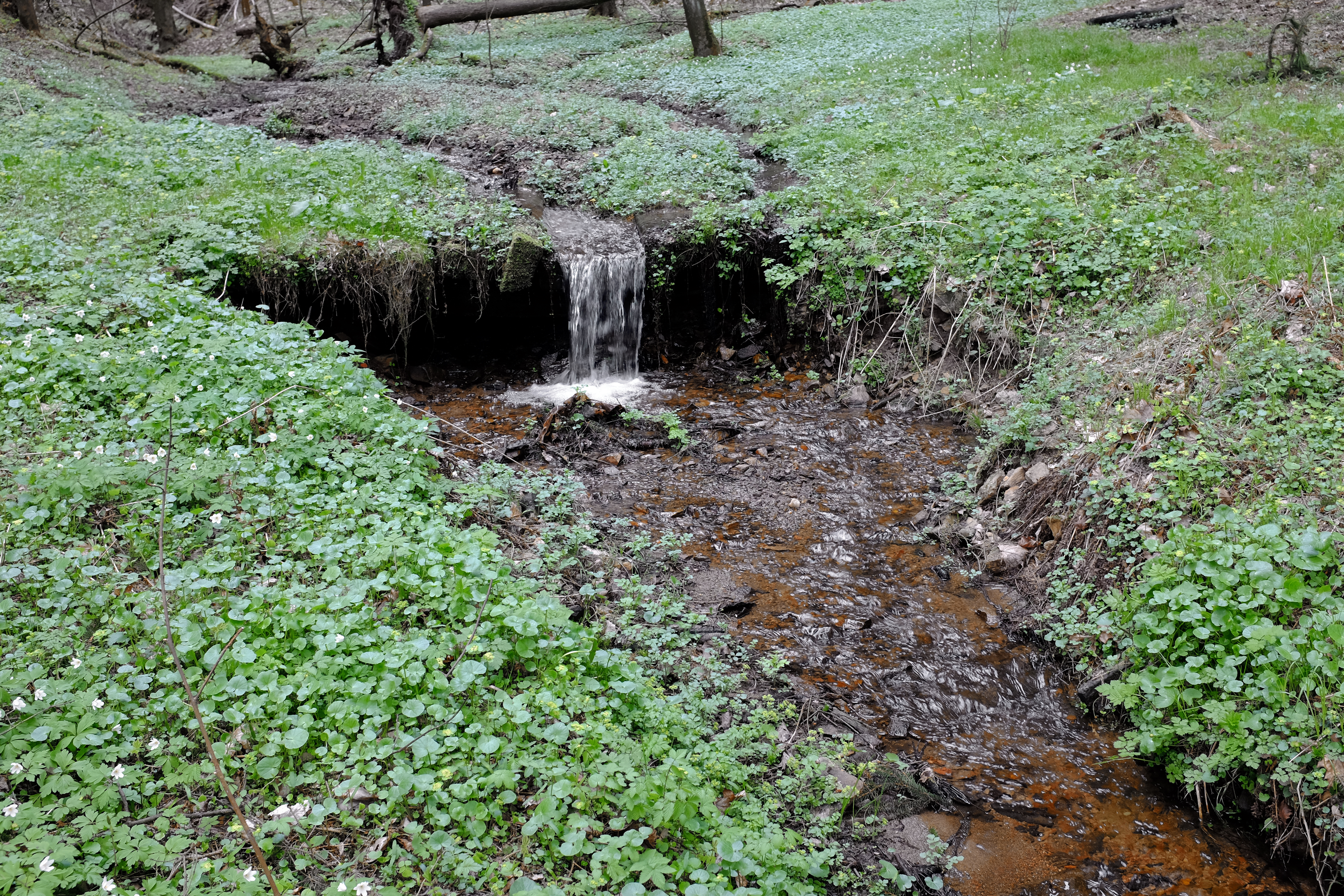 Svažecký potok, přítok Plesné, v místě u obce Nový Kostel, okres Cheb